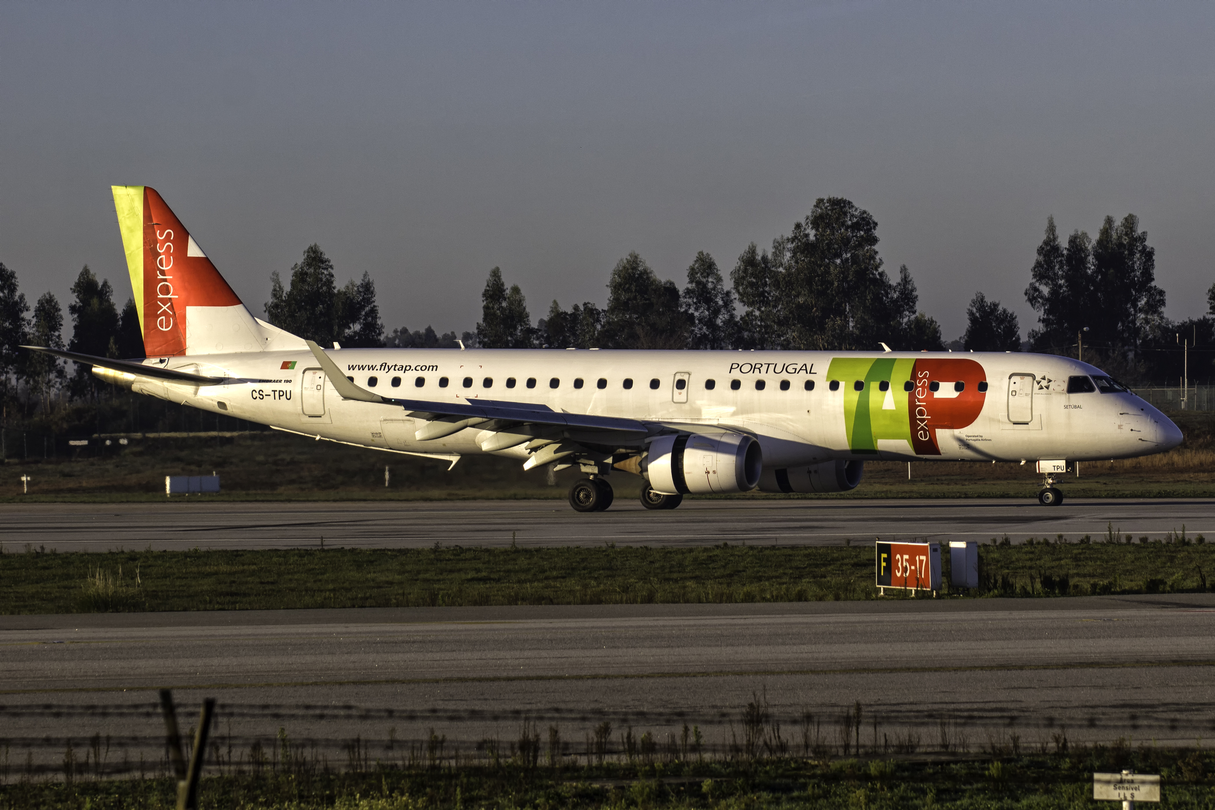 Embraer 190 de TAP Express tras aterrar no aeroporto do Porto.